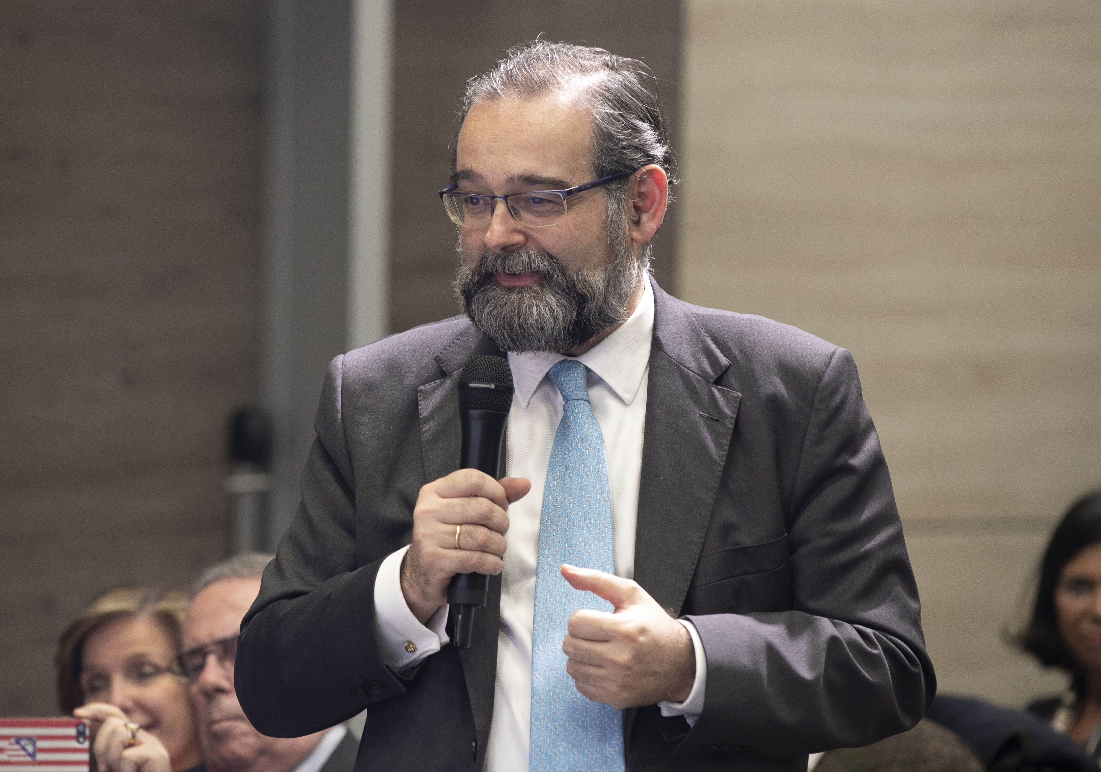 Conferencia Adolfo Suarez Illana dentro del FORO MADRID del Partido Popular de Madrid.